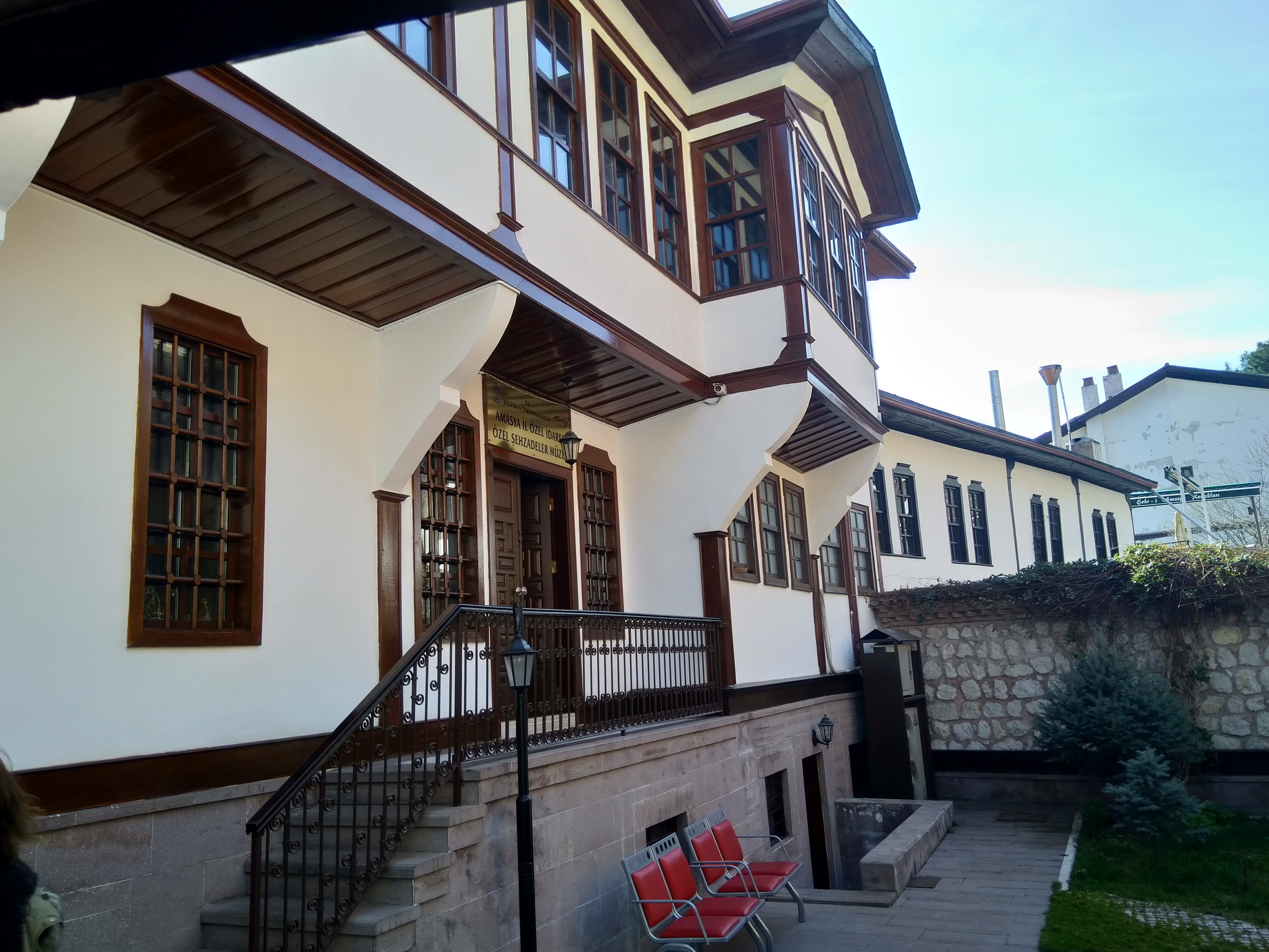 Amasya'daki Şehzadeler Müzesinin ön cephesi.